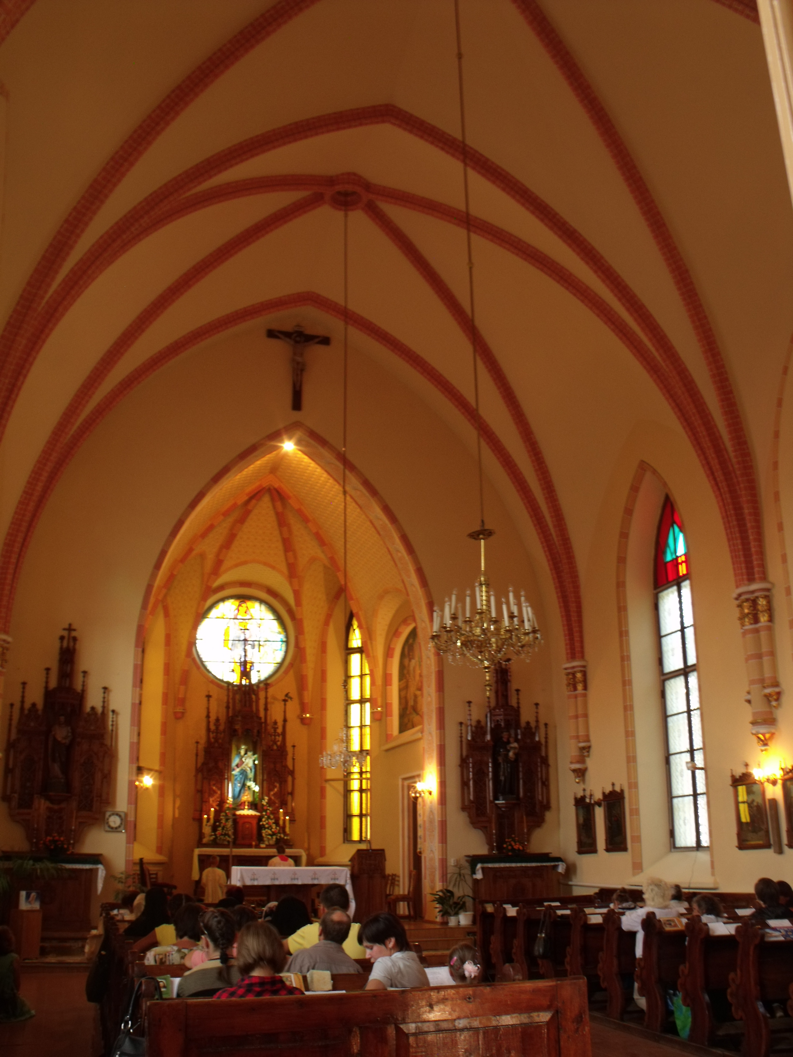 Костьол св. Олексія: Вінницька обл, м.Жмеринка